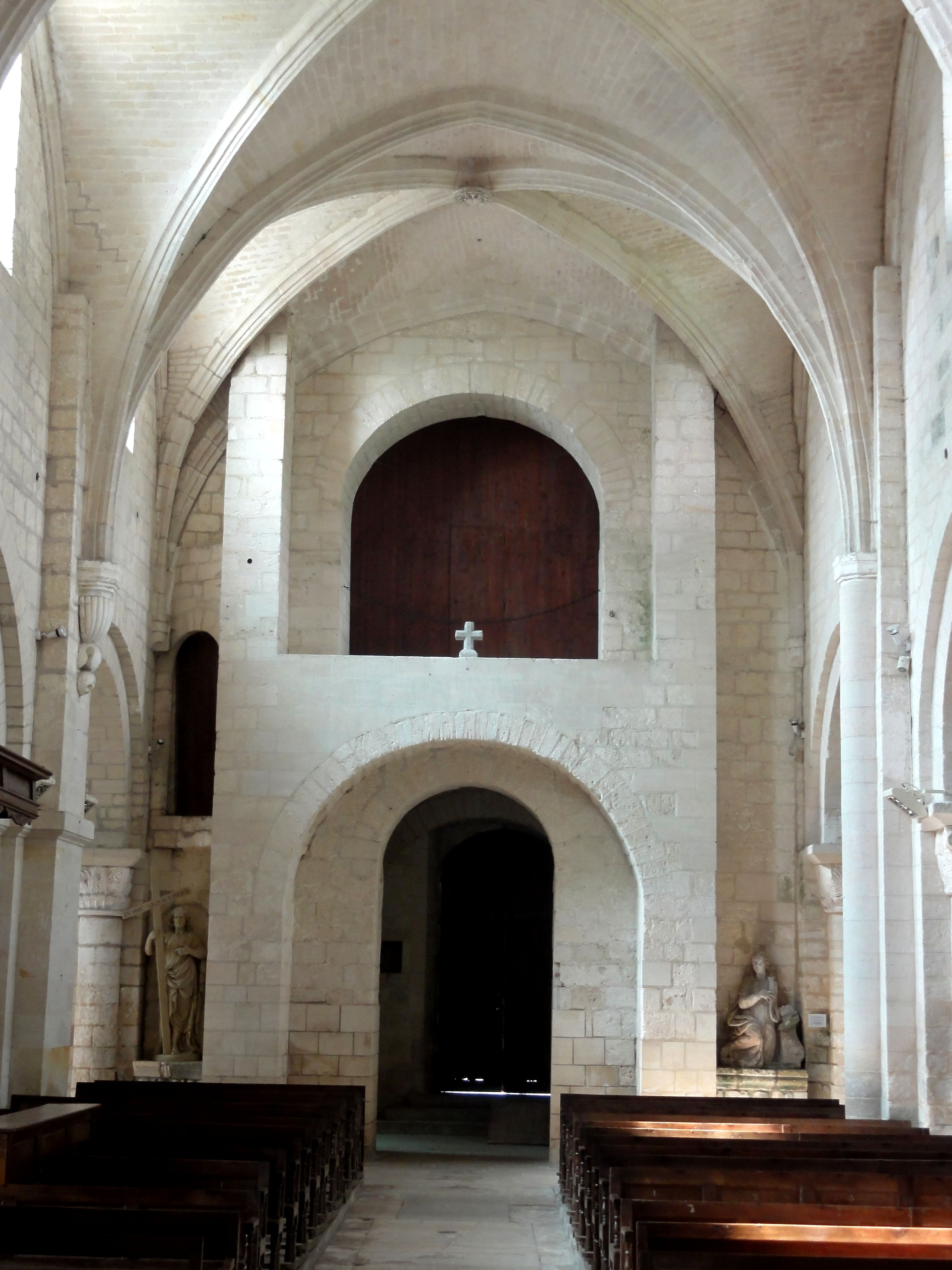 Extrémité ouest de la nef - tribune dans la base du clocher.